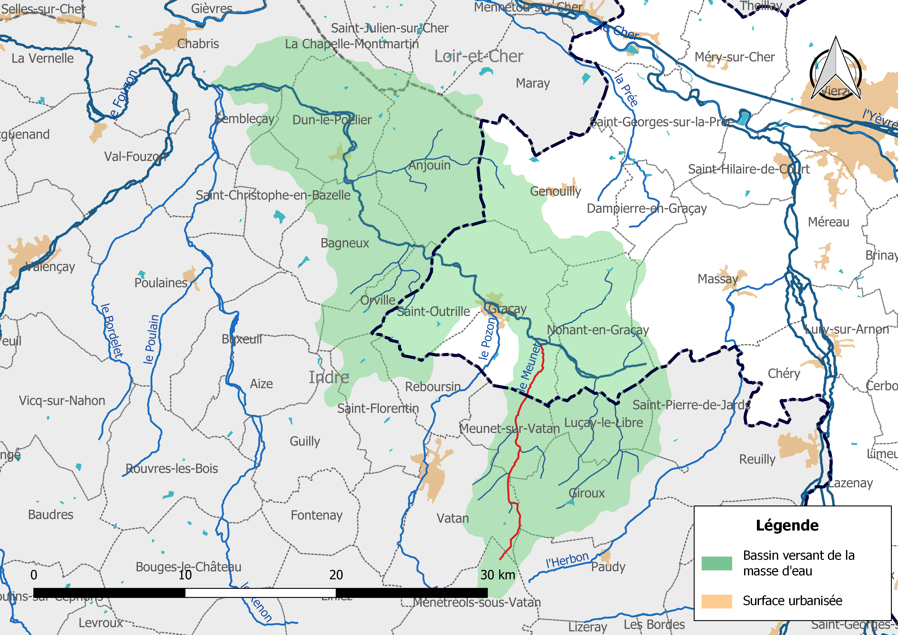 Carte de la masse d'eau « FRGR0344 », avec mise en exergue du cours d'eau « le Meunet » (en rouge).